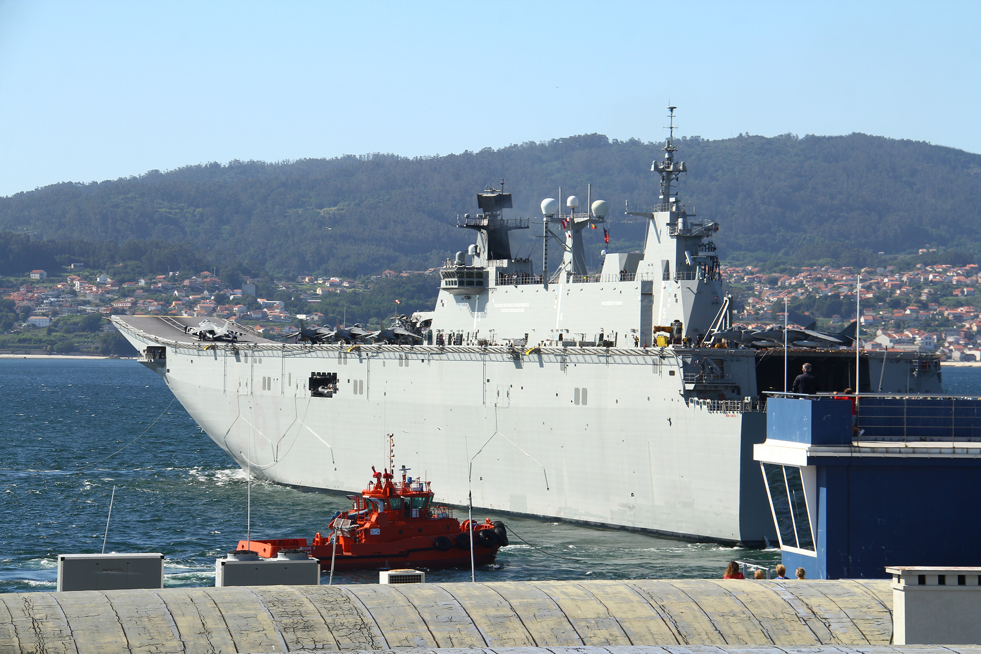 El portaaeronaves "Juan Carlos I" L-61 zarpando de Vigo El portaaeronaves "Juan Carlos I" L-61, buque insignia de la Armada Española, zarpando de Vigo el 4 de junio de 2017. "Juan Carlos I" L-61 aircraft carrier sailing from Vigo "Juan Carlos I" L-61 aircraft carrier, flagship of the Spanish Navy, sailing from Vigo on June 4, 2017.